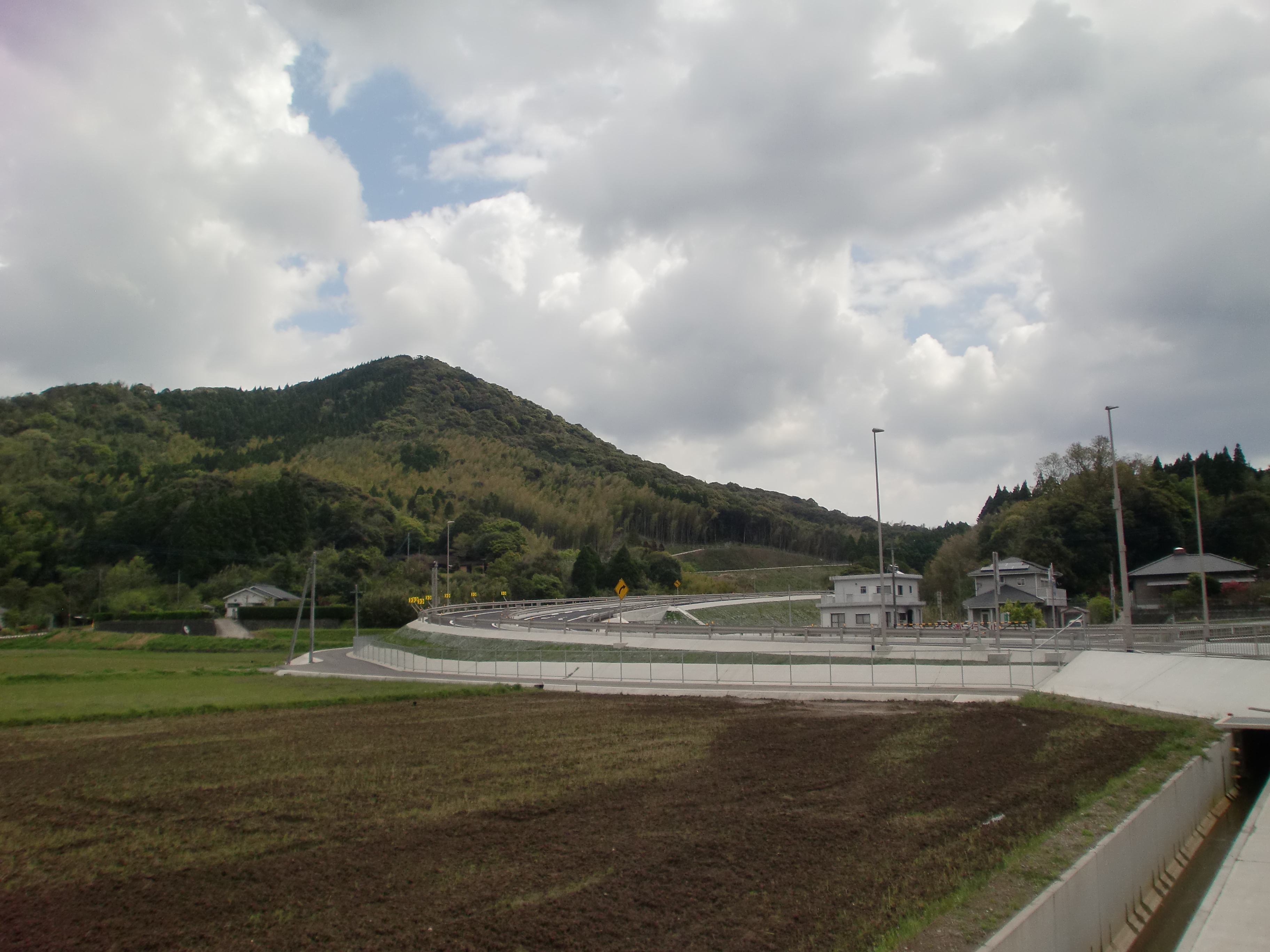 薩摩川内水引インターチェンジを国道3号付近から鹿児島方面に望む。